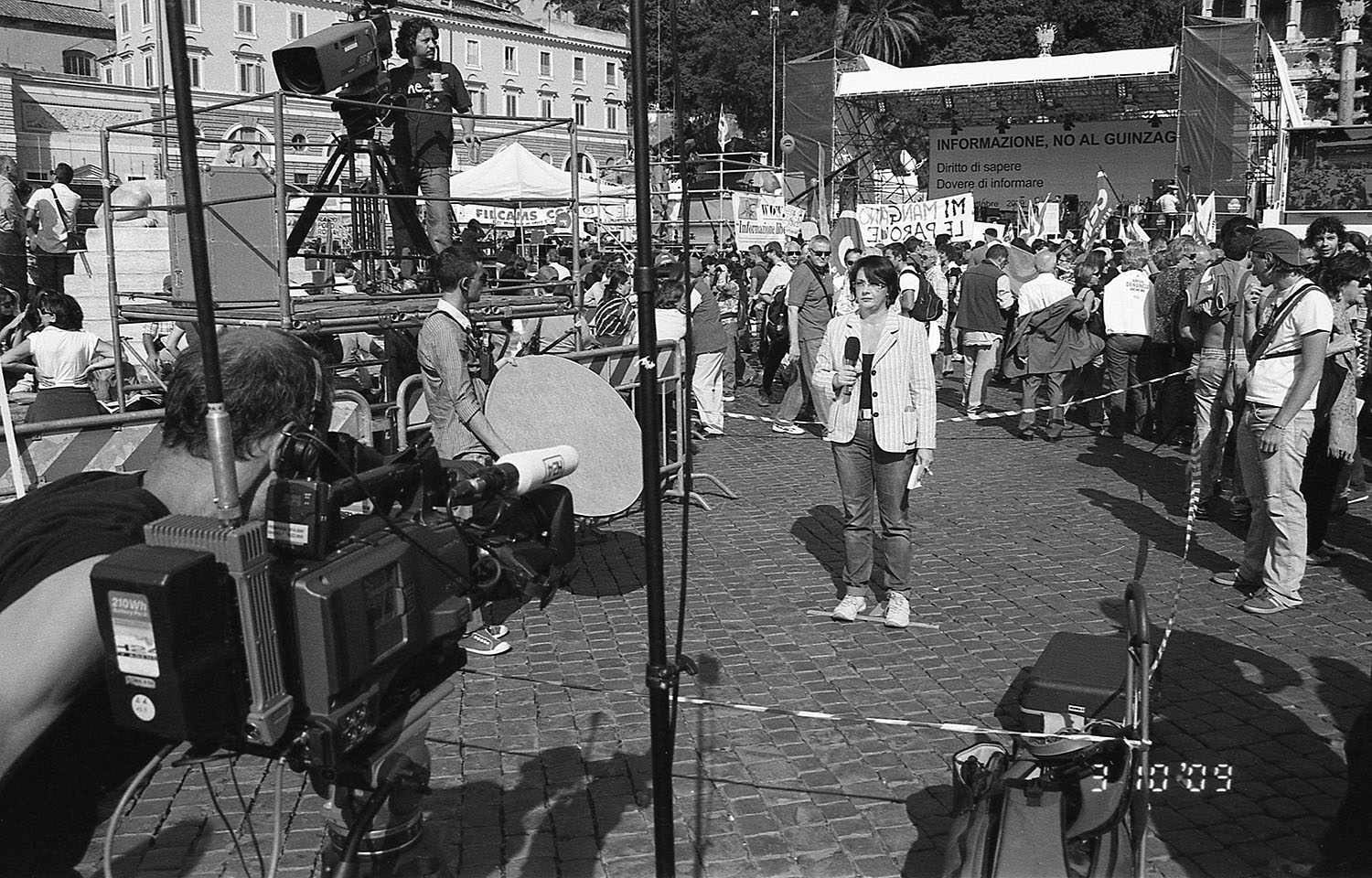 Giuseppina Patermiti in collegamento RAI 2009